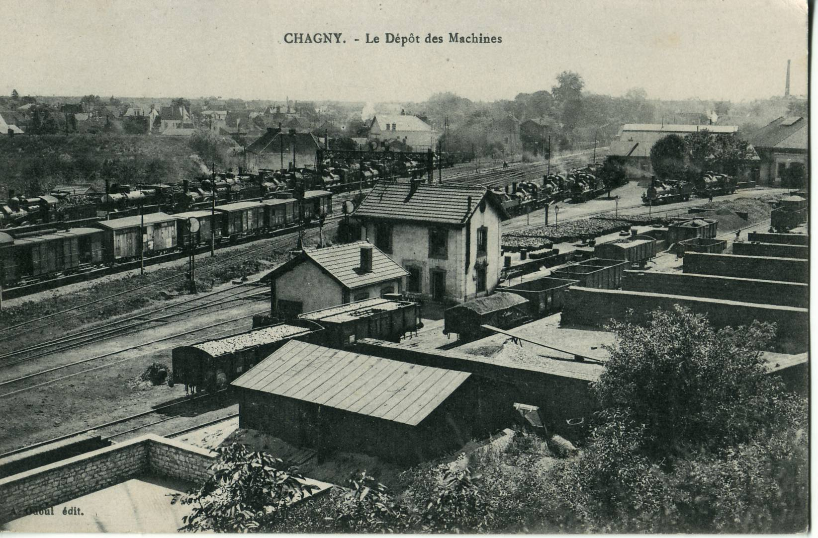 Carte postale ancienne éditée par A. Odoul :CHAGNY - Le Dépôt des Machines